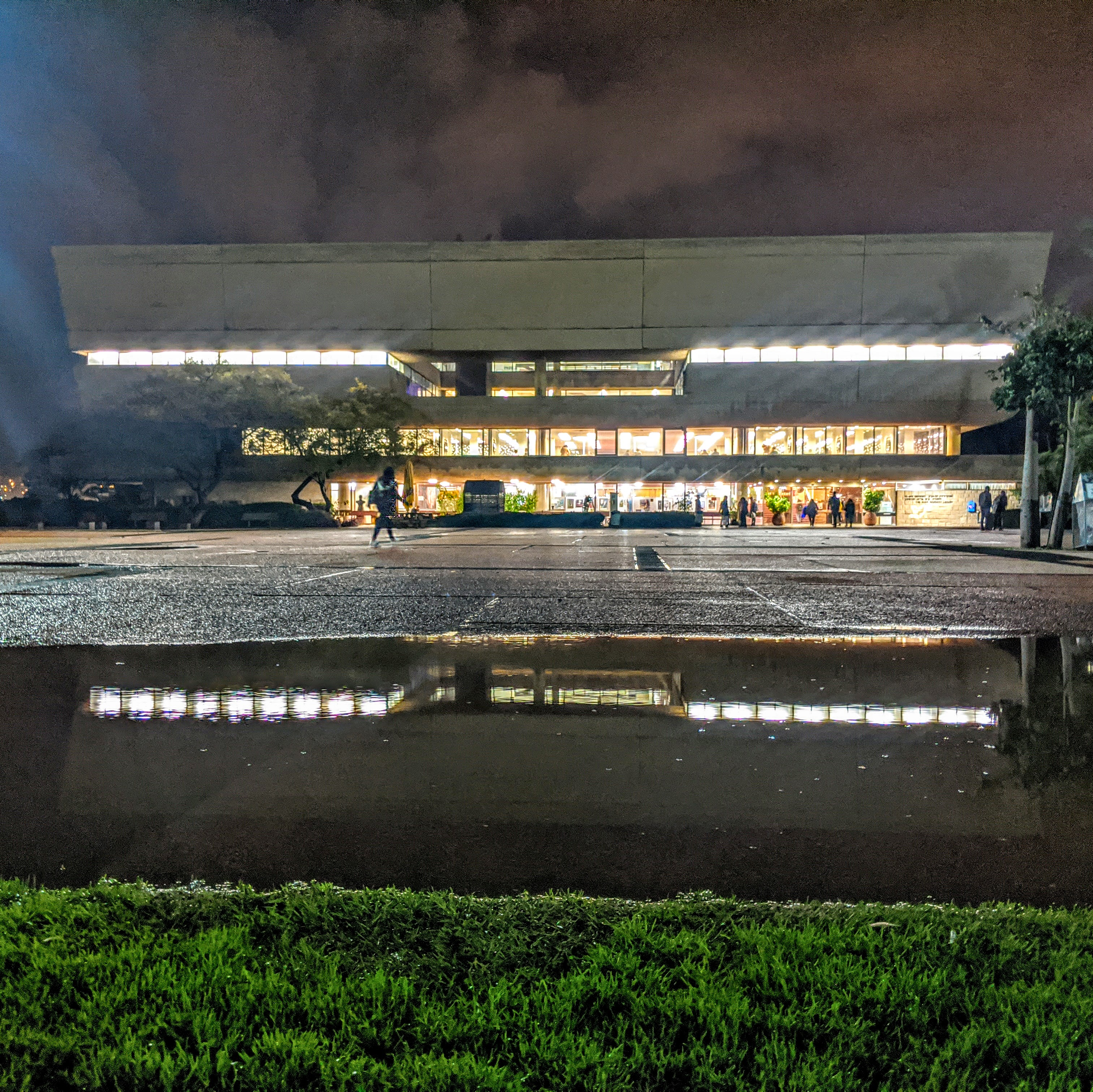 הספרייה המרכזית ע"ש סוראסקי, אוניברסיטת תל-אביב